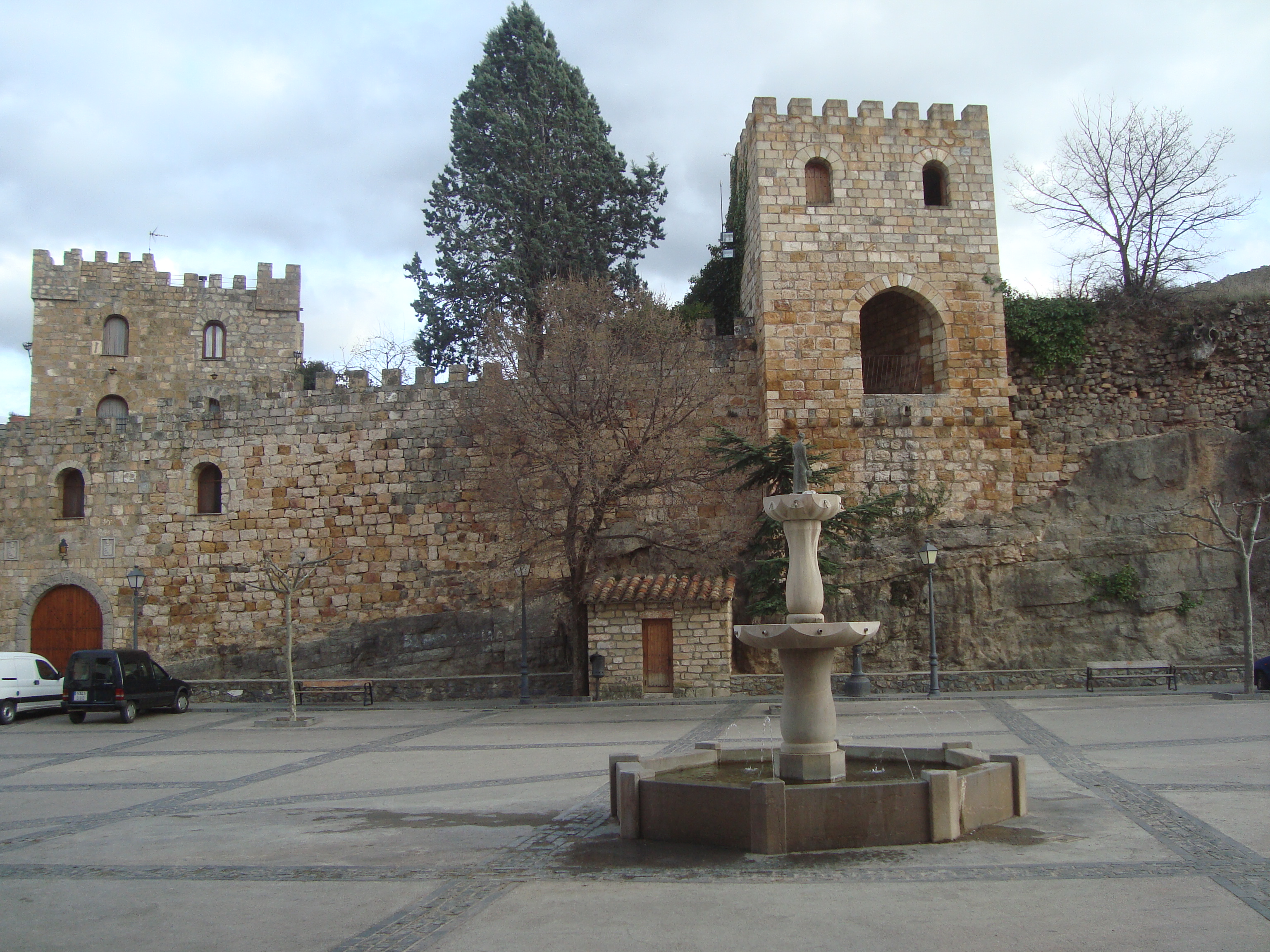 Castell de Vilafermosa 08.130-004.